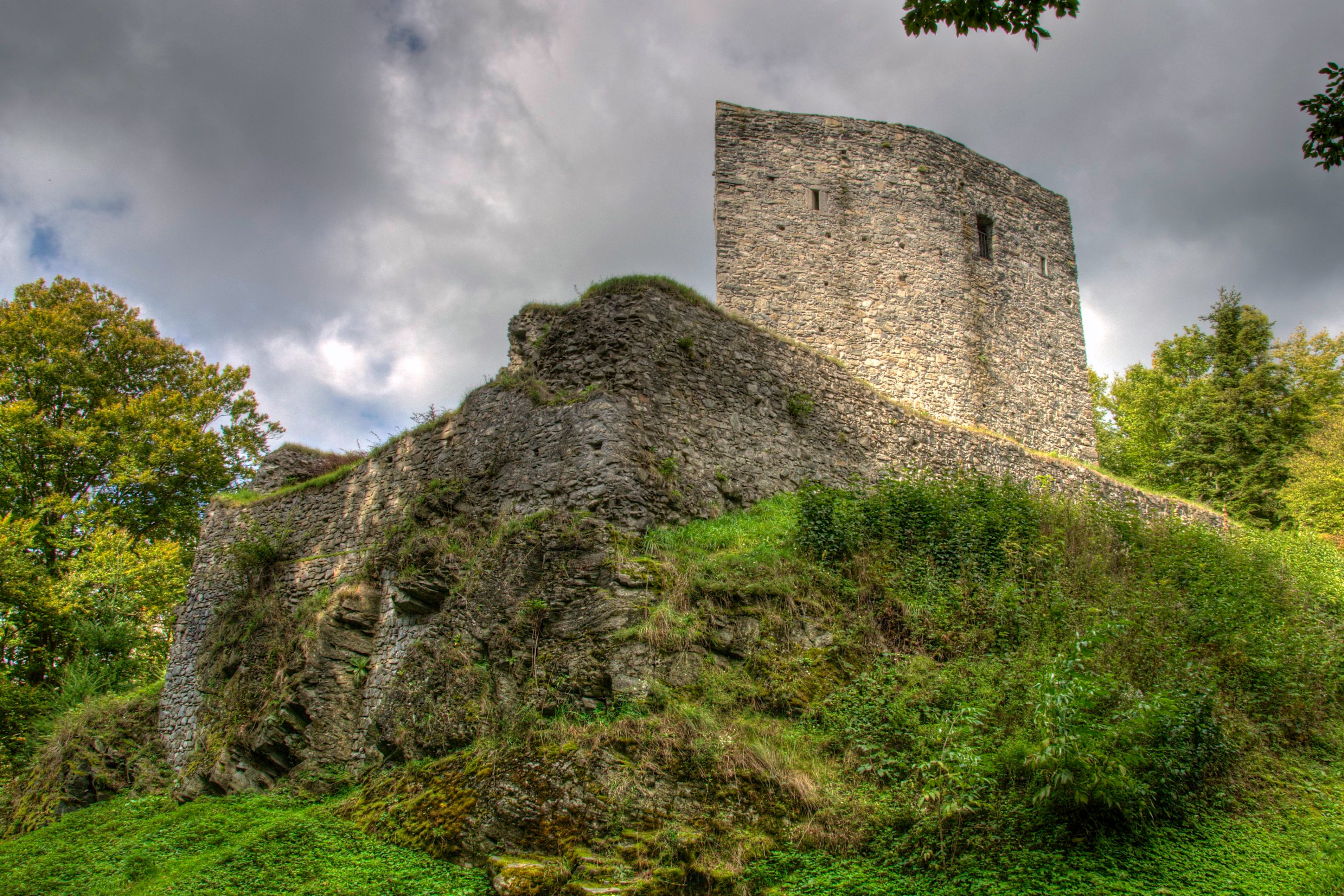 Celkový pohled na předsunutou bateriovou věž Českého Šternberku od jihovýchodu